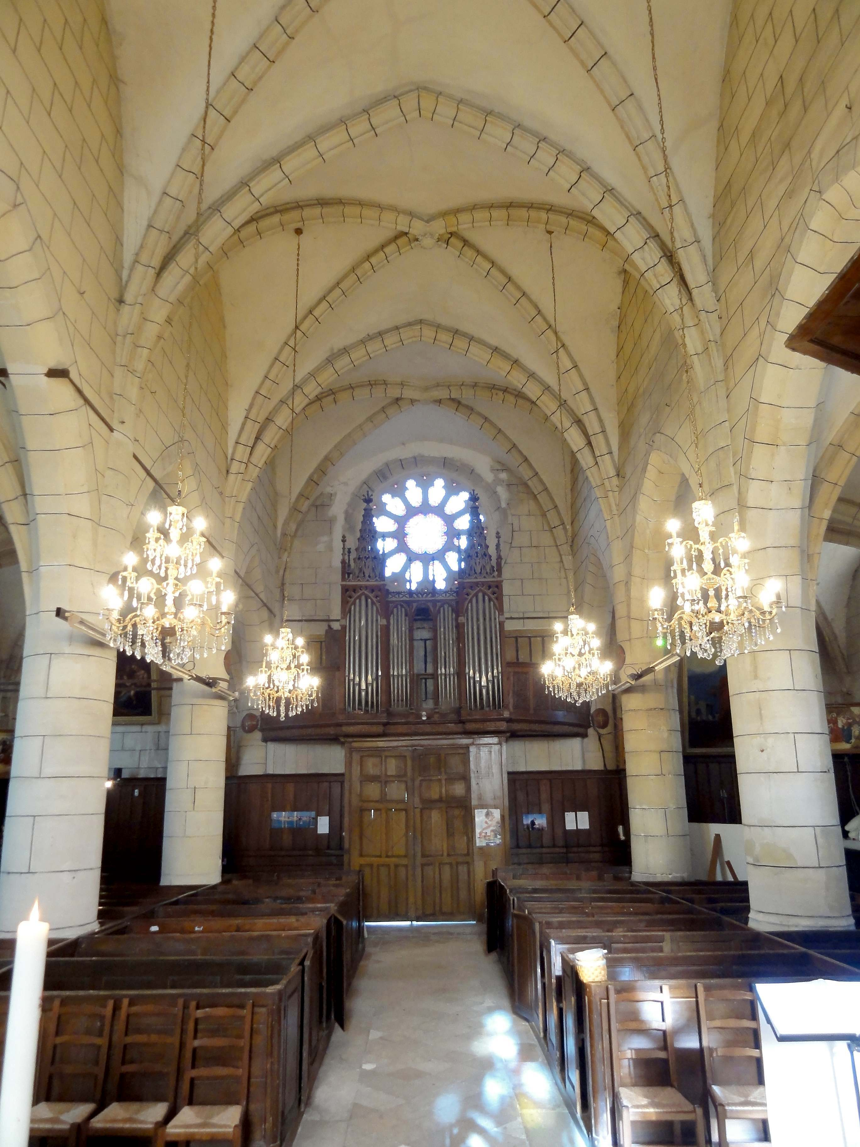 Intérieur de l'église (voir titre).